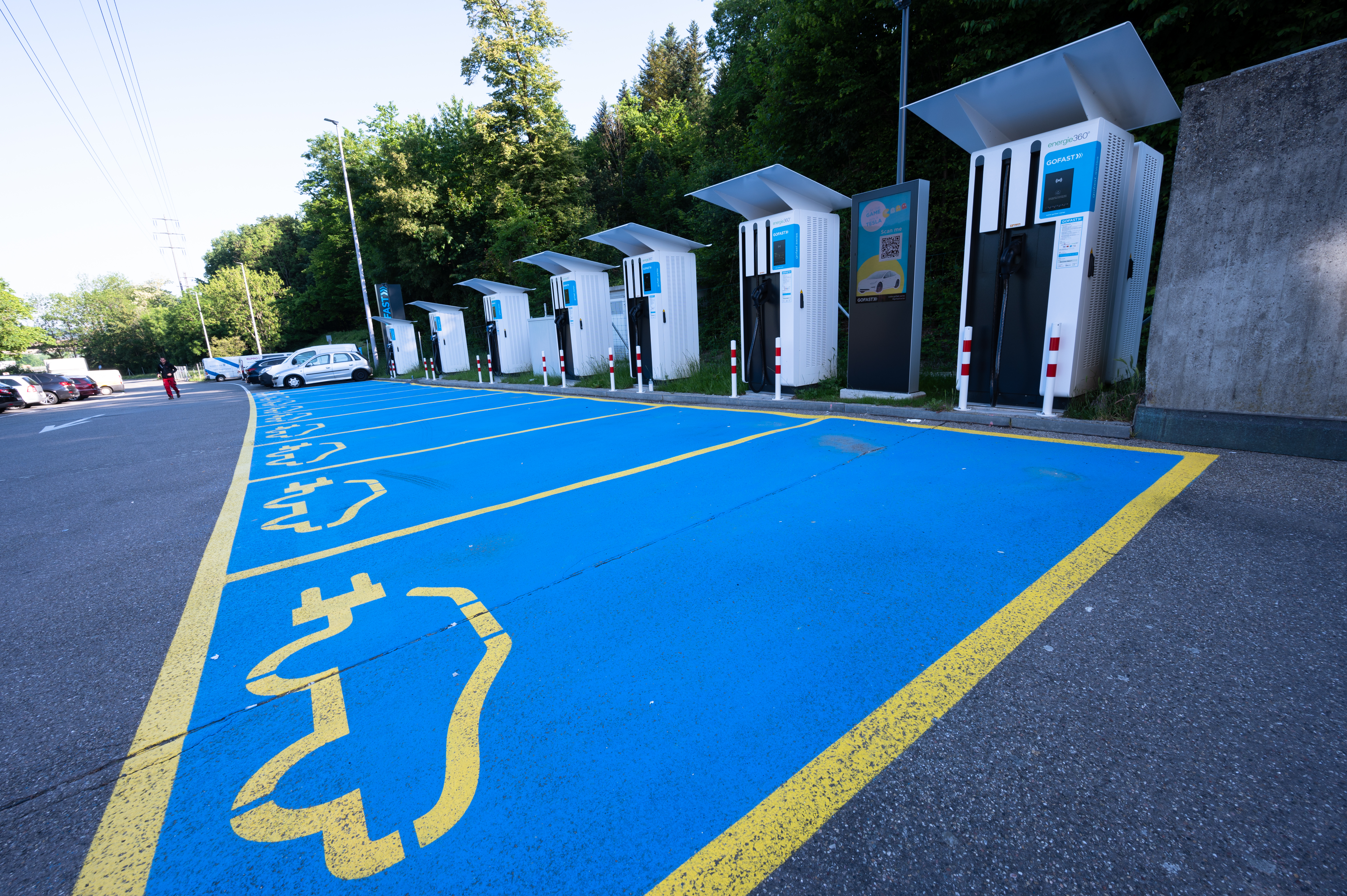 10 von insgesamt 20 Elektroladestationen für Elektroautos aller Typen vor dem Eingang der Raststätte